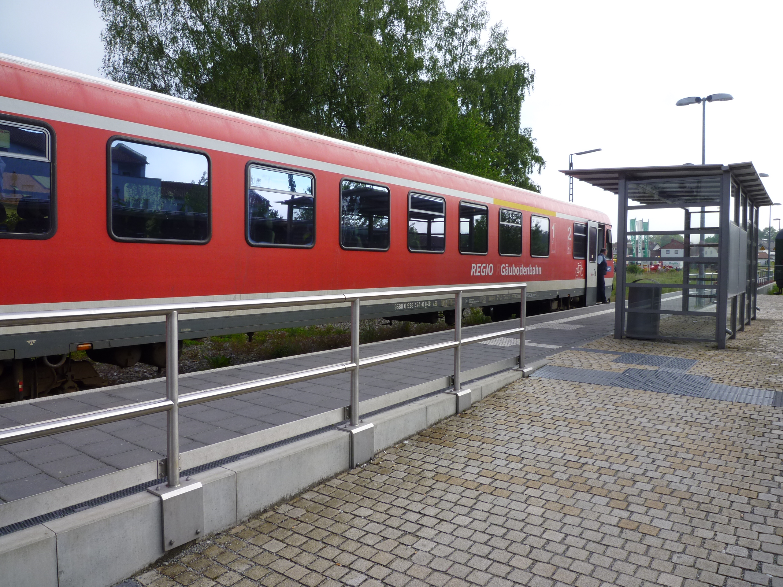 Die Gäuboden-Bahn am Bahnhof in Bogen. Die Gäuboden-Bahn pendelt zwischen Neufahrn/Niederbayern und Bogen und schafft die Anbindung zu den großen Bahnstrecken Plattling, Regensburg, Landshut.